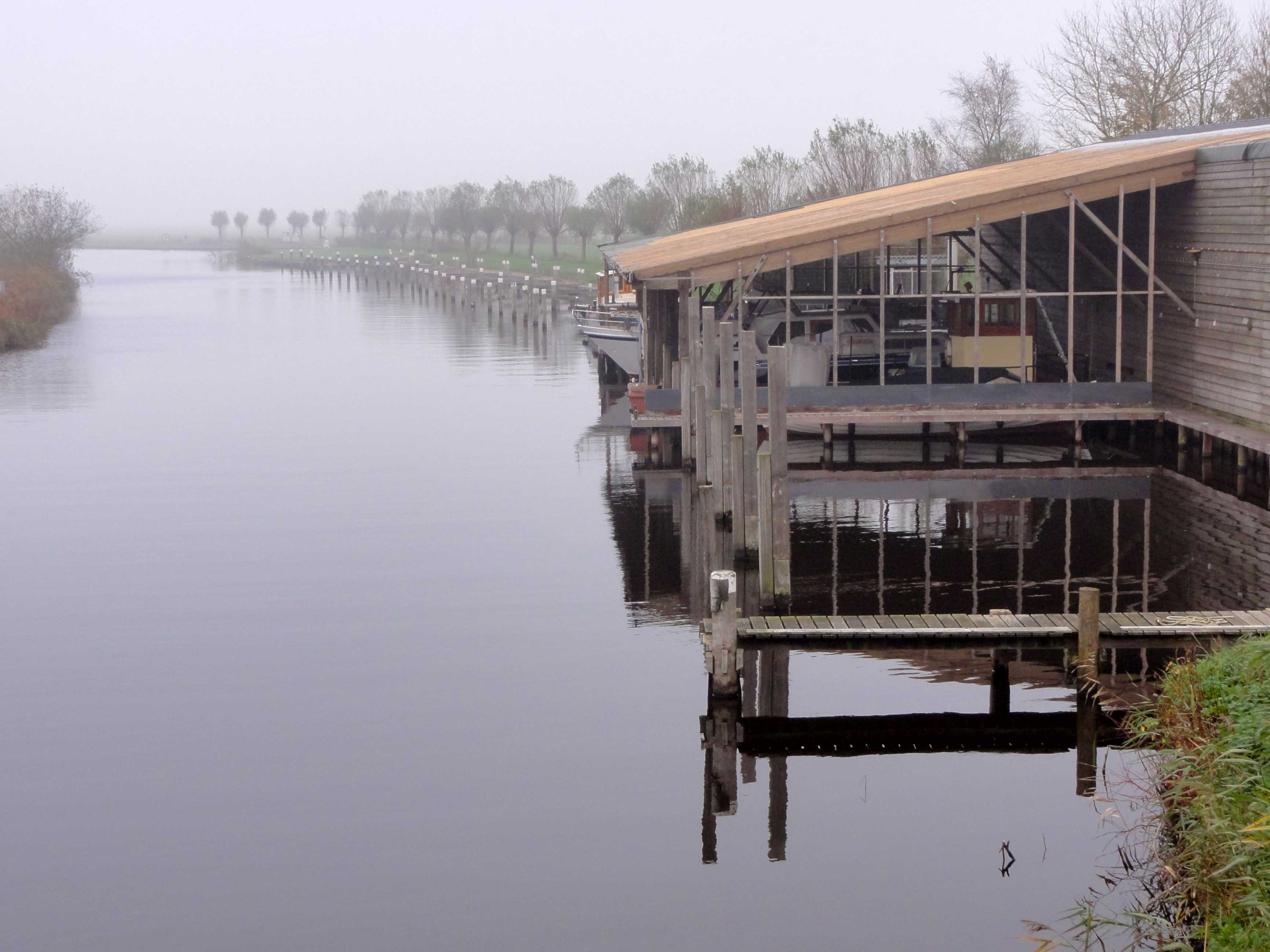 De Linde even ten noordwesten van Ossenzijl